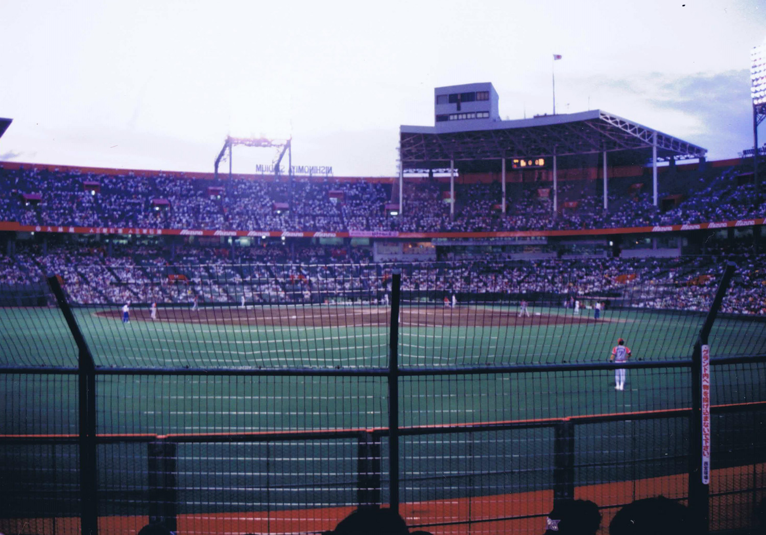 西宮球場のレフト側スタンドから見たグランド全景（1989年）